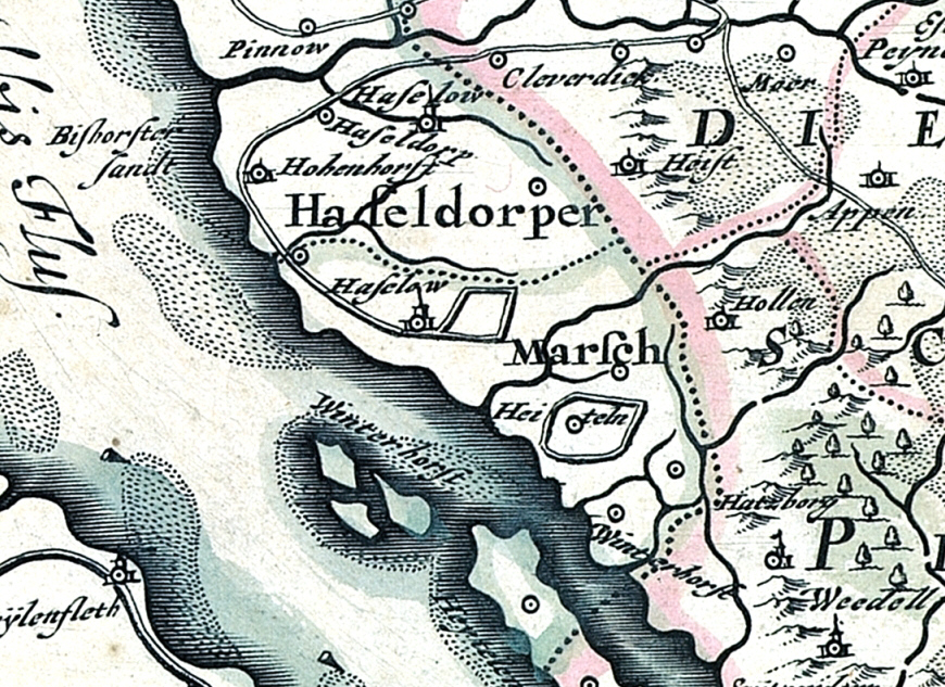 Die Haseldorfer Marsch, Ausschnitt aus der "Landtcarte des Fürstenthumbe Stormarn" von Johannes Mejer (* 1606 Husum; † 1674 Husum) aus dem Jahr 1650